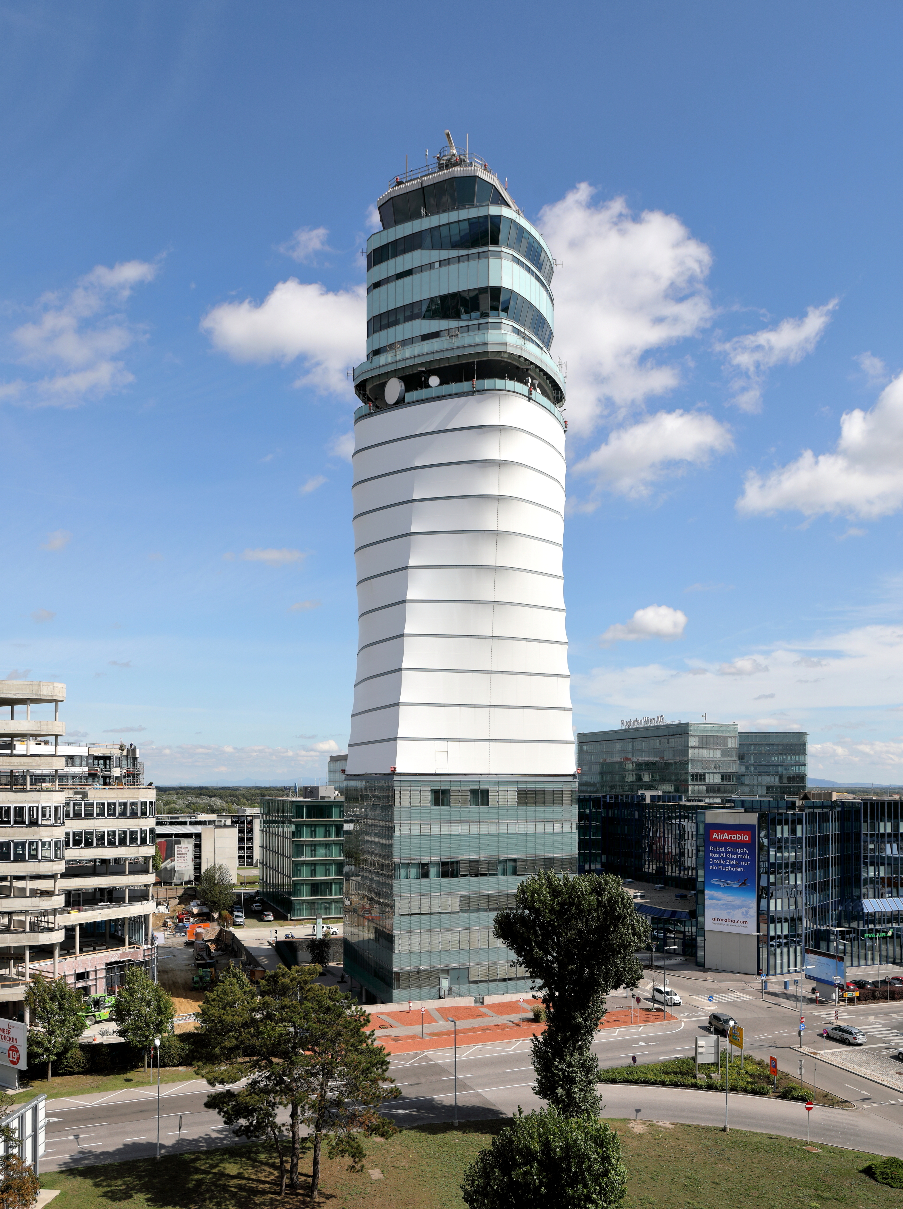 Der Tower des Vienna International Airports in der niederösterreichischen Stadtgemeinde Schwechat.Der 109m hohe Tower ist an der Haupteinfahrt zum Flughafen situiert, fungiert so als städtebauliches Zeichen mit Signalcharakter und wurde nach Plänen des Wiener Architektenbüros Zechner & Zechner errichtet. Nach rund zwei Jahren Bauzeit fand am 13. September 2005 die offizielle Eröffnung statt. Die Errichtungskosten betrugen inklusive der technischen Einrichtungen rund 50 Millionen Euro. Der Tower hat eine sechsgeschoßige Sockelzone. Der Mittelbereich besteht aus einem runden Stahlbetonschaft. An diesem ist eine Stahlkonstruktion für die Membran-Bespannung befestigt, die als Projektionsfläche verwendet werden kann. An der Spitze ist der Kontrollturm zur Basis um ca. 45 Grad verdreht. Das Bauwerk wurde mit dem Europäischen Stahlbaupreis 2005, dem AR Award for emerging architecture 2005 und von der Industrial Fabrics Association International (IFAI) mit dem Outstanding Achievement Award 2006 ausgezeichnet.